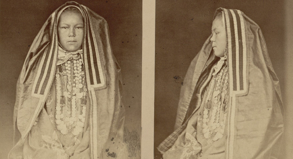 Башкирка. Фото К. Фишера. 1870-е. Оренбург